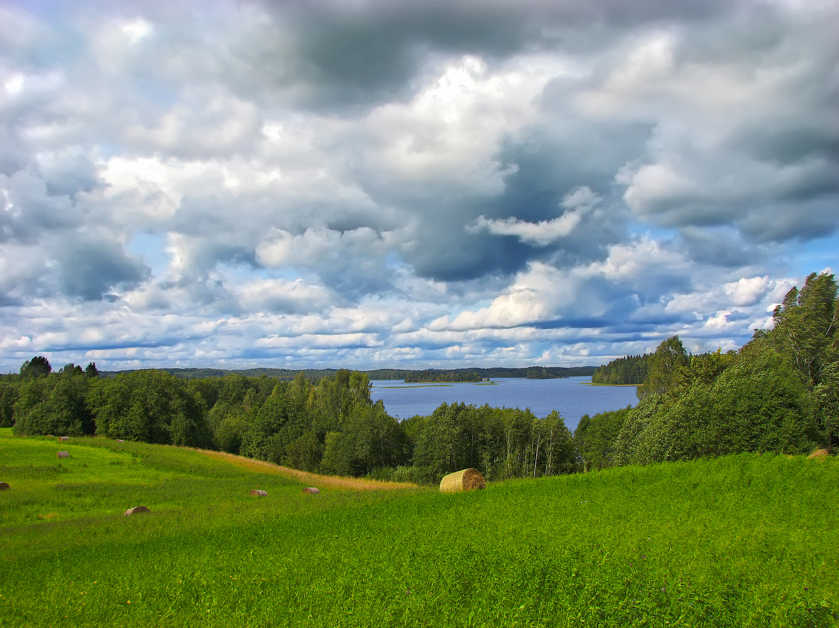 озеро Инесис